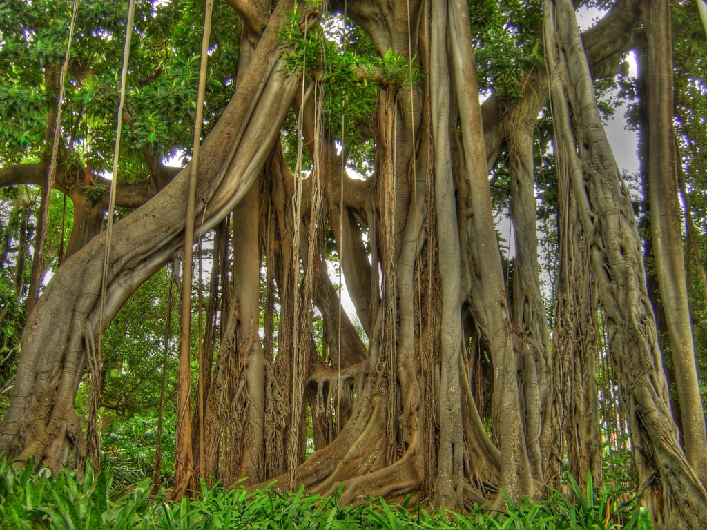 Würgefeige im Bot. Garten von La Orotava, Tenerife.